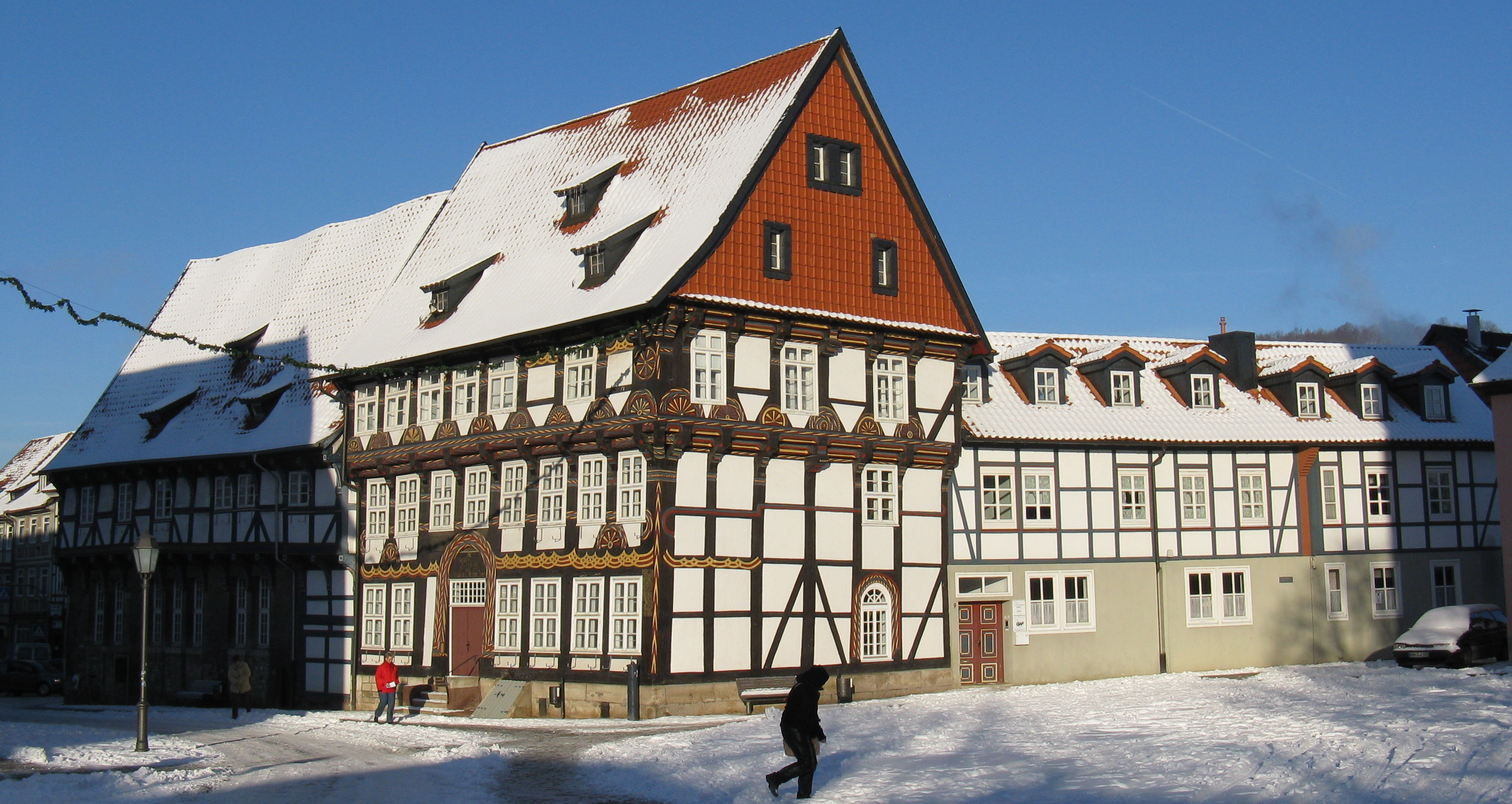 Bad Gandersheim - Historische Fachwerkhäuser - Links: „Bracken“ Markt Nr.8, mitte: „Rickesche Haus“ Markt Nr.9